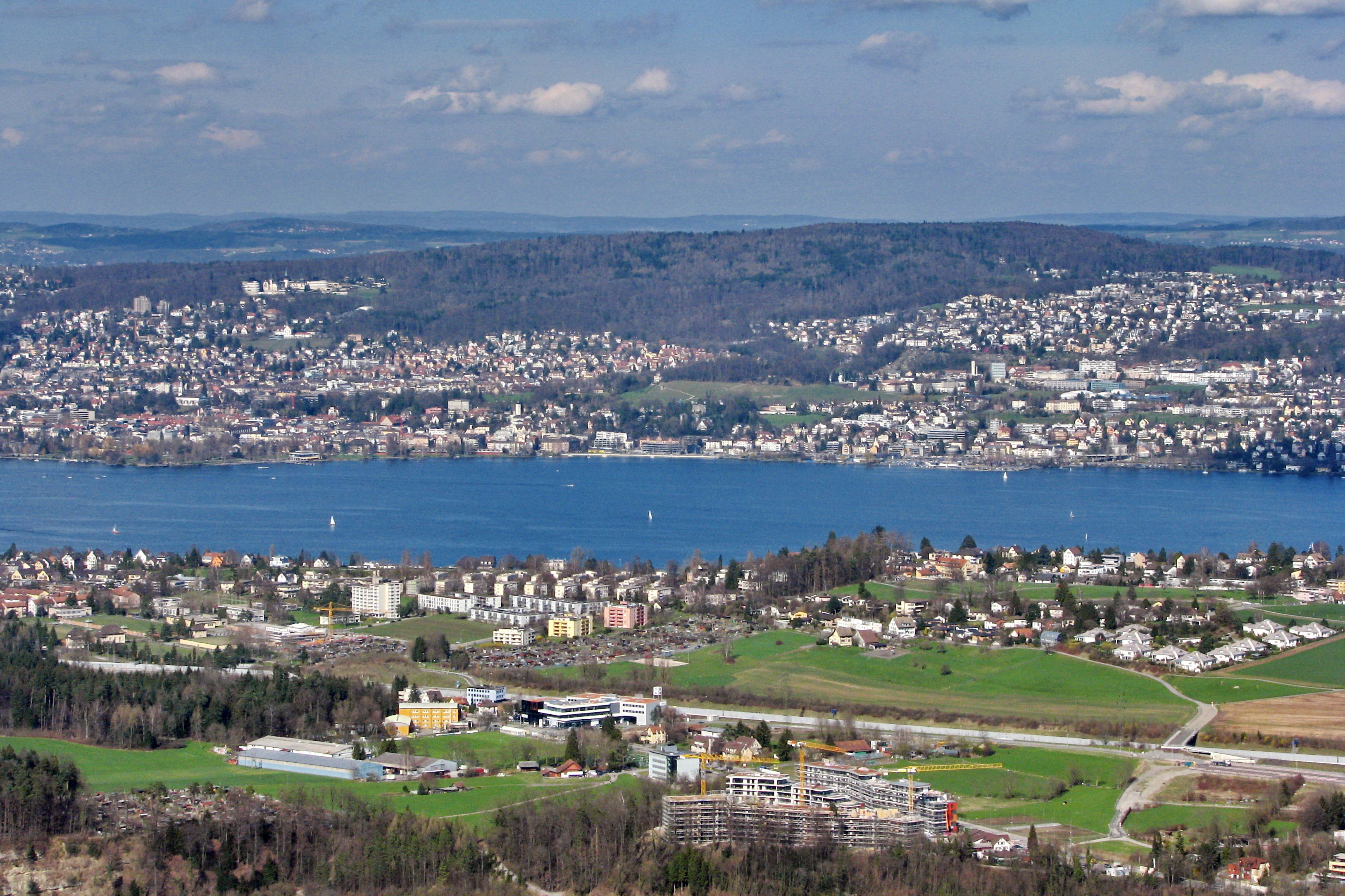 Adlisberg and Zürichsee, as seen from Felsenegg, Kilchberg in the foreground.